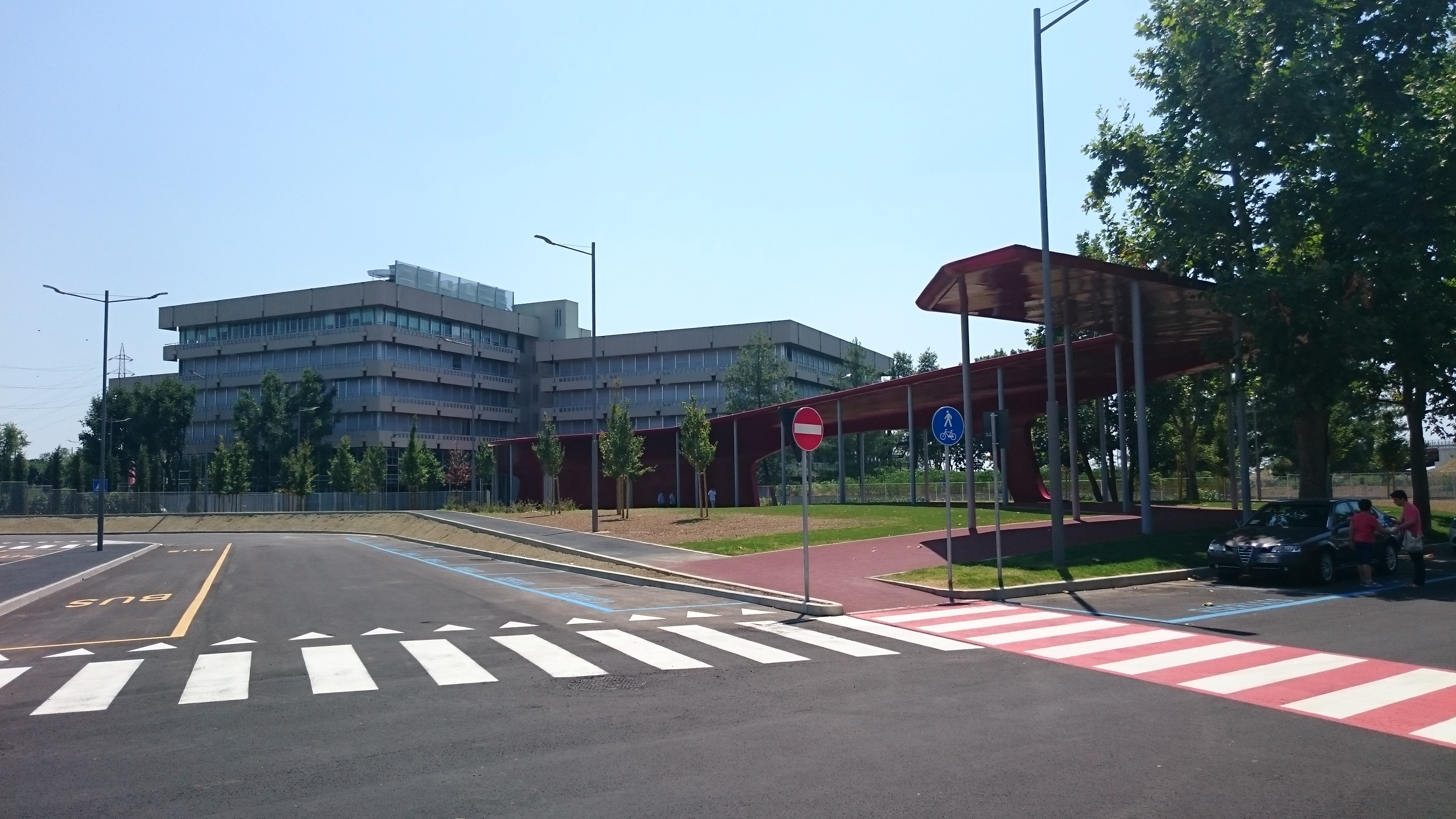 Attraversamenti pedonali al Museo Alfa Romeo di Arese